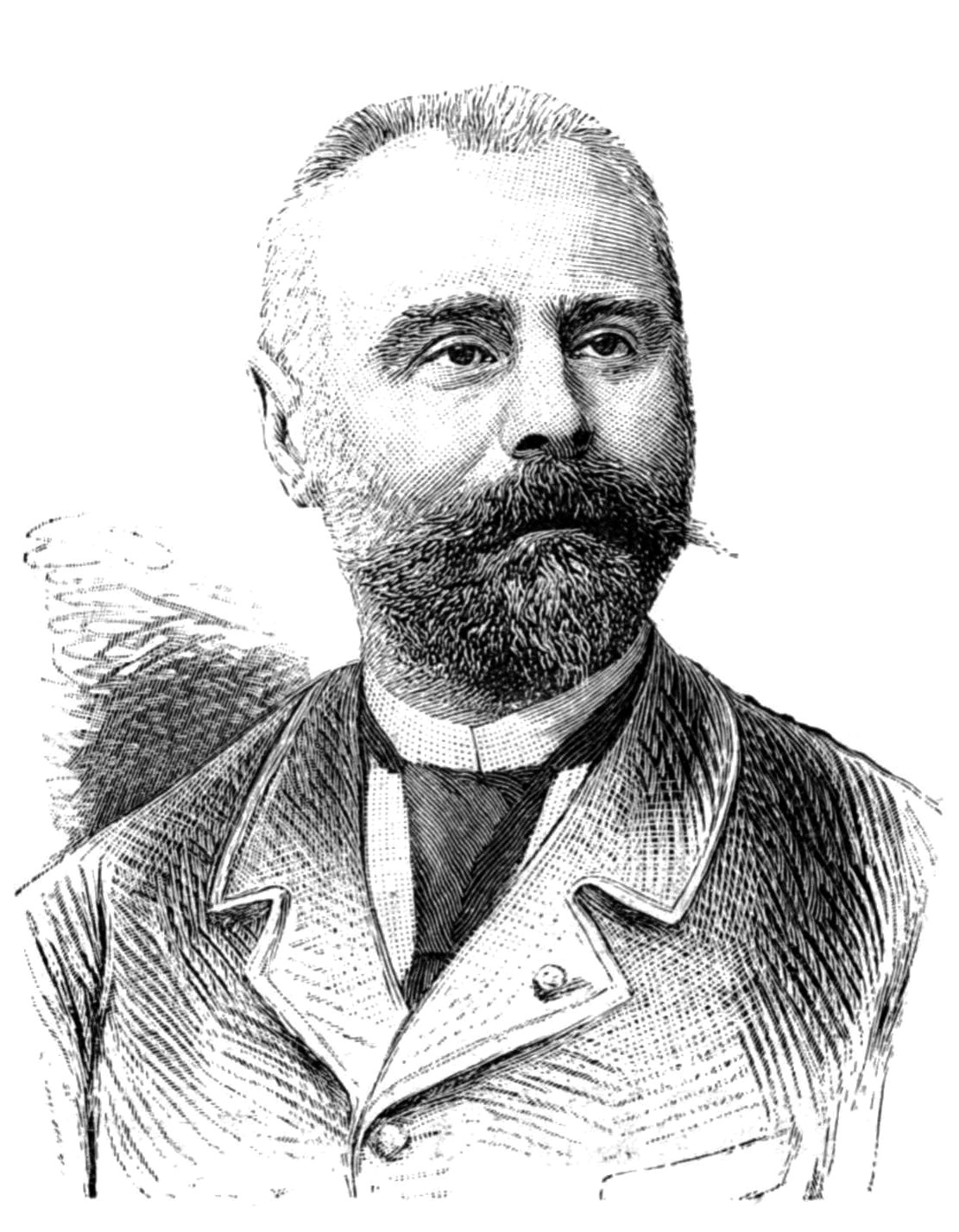 "M. Grodet, le nouveau gouverneur civil du Soudan français".